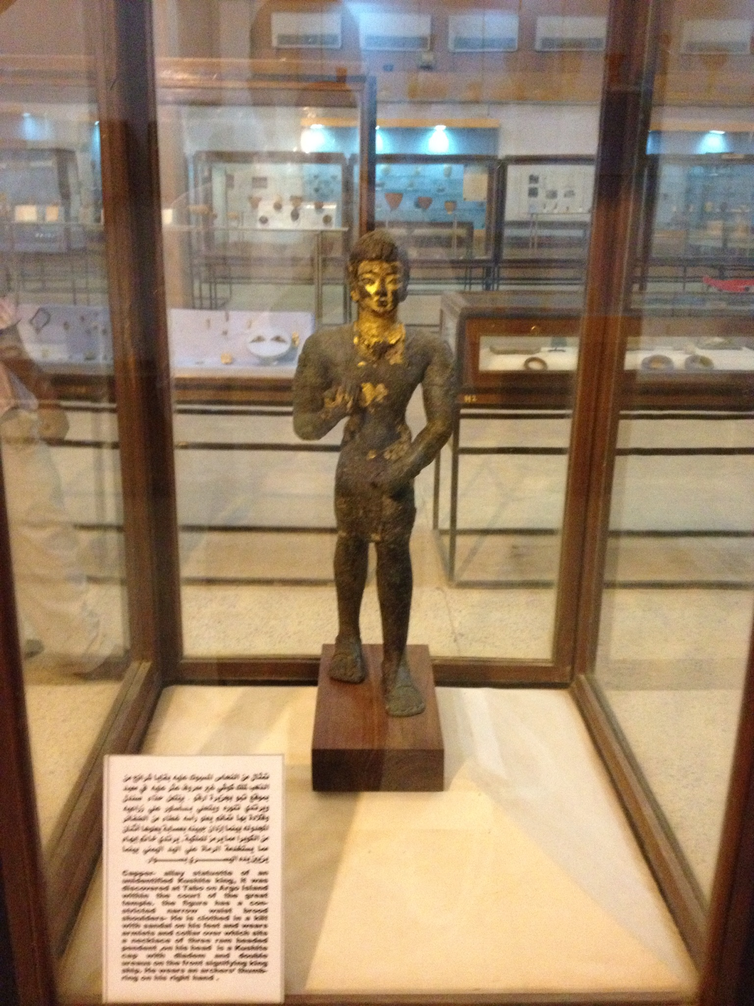 تصنيف:تاريخ السودان تصنيف:متاحف السودان تصنيف:فن أفريقي تصنيف:نحت تصنيف:حضارات قديمة تصنيف:حضارة تصنيف:كوش